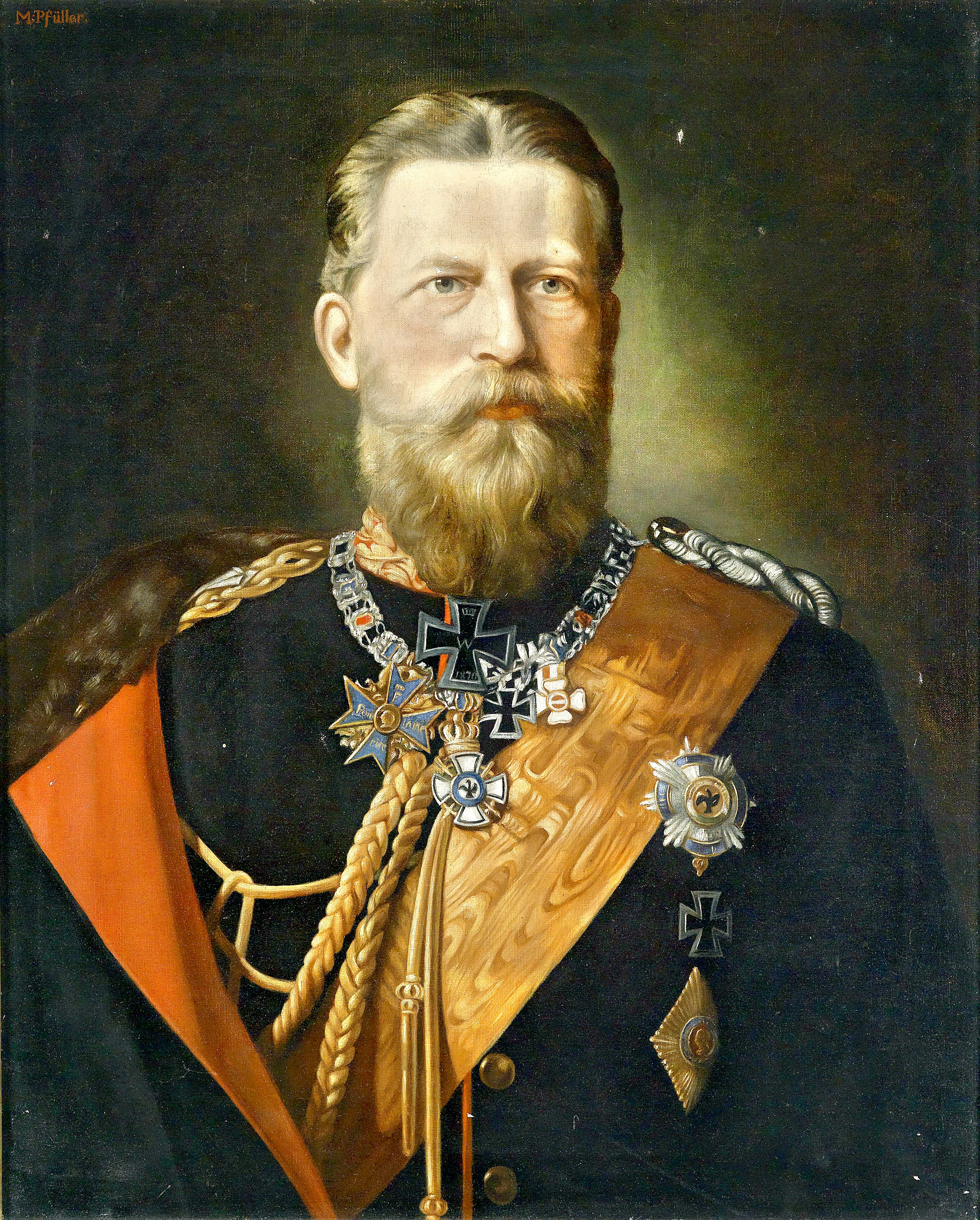 Kaiser Friedrich III., König von Preußen; Porträt in Feldmarschallsuniform mit Ordensschmuck